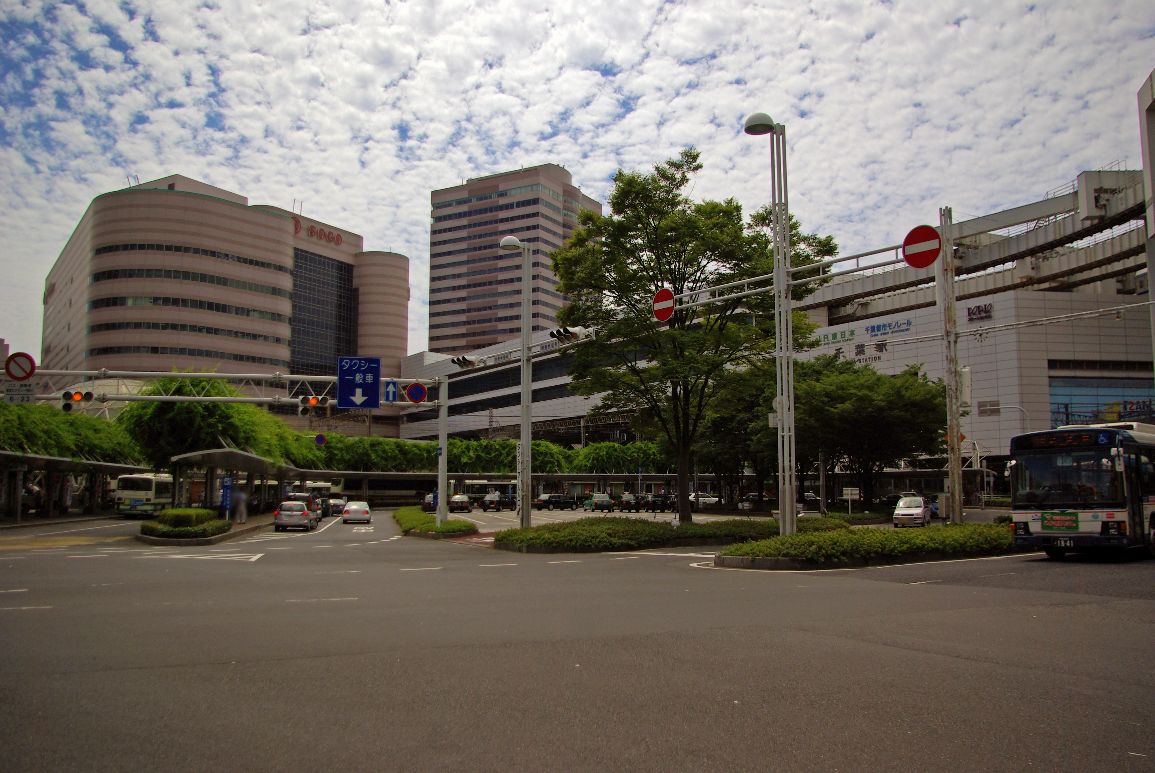 東日本旅客鉄道株式会社総武本線、外房線千葉駅、千葉都市モノレール千葉駅